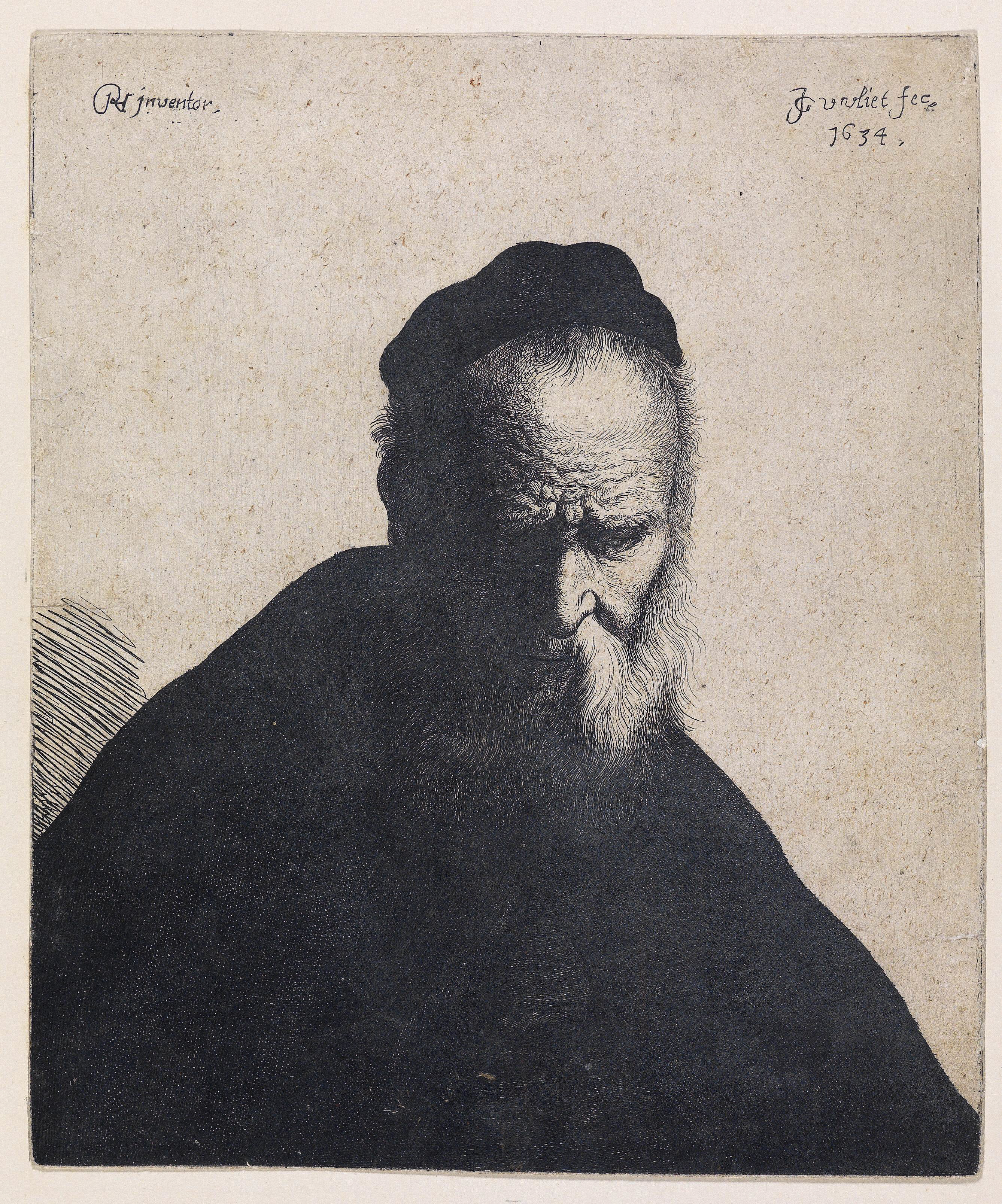 Brustbild eines Greises mit langem weißen Bart und Mütze, Radierung, in der Platte bezeichnet "RH. jnventor", signiert und datiert J. G. v. vliet fec. 1634, 22,4 x 18,8 cm